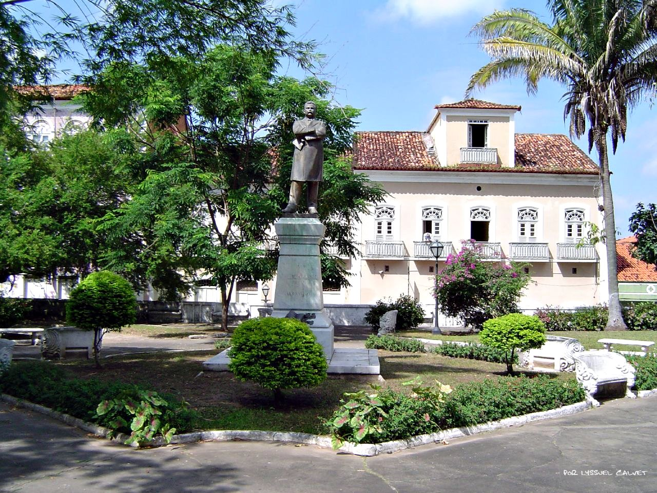 A Praça Benedito Leite situa-se entre as Ruas de Nazaré, Palma e o Beco da Sé, portanto num dos sítios mais antigos de São Luís. Era conhecida, originalmente, como Largo Velho do Val, ou Vale, e em suas imediações funcionou, num prédio hoje reformado (Centro Caxeiral), o Recolhimento de Nossa Senhora da Anunciação e Remédios para moças donzelas, fundado pelo padre jesuíta Gabriel Malagrida.